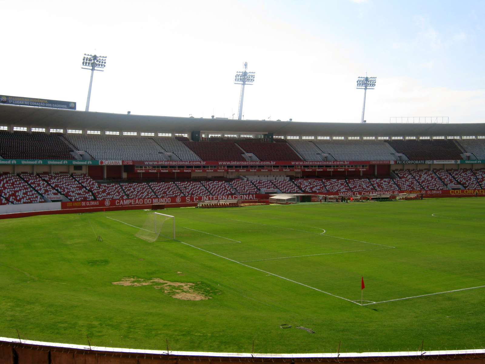 Porto Alegre 02 Internacional stadium (13)